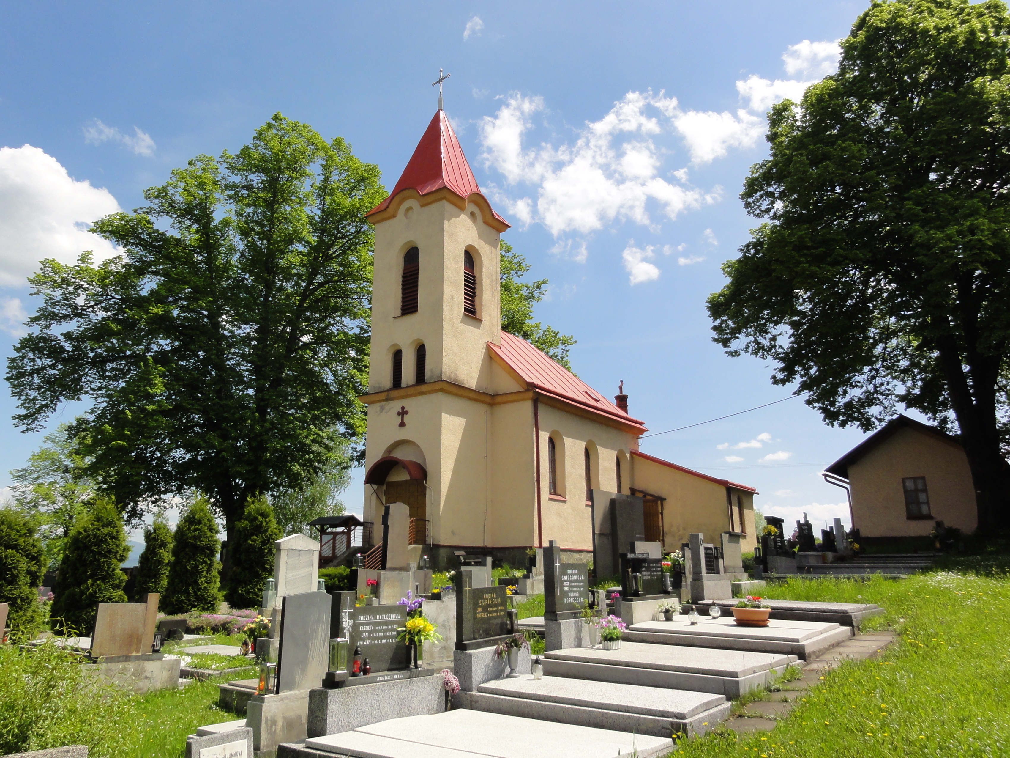 Czeski Cieszyn, Górny Żuków, kościół katolicki